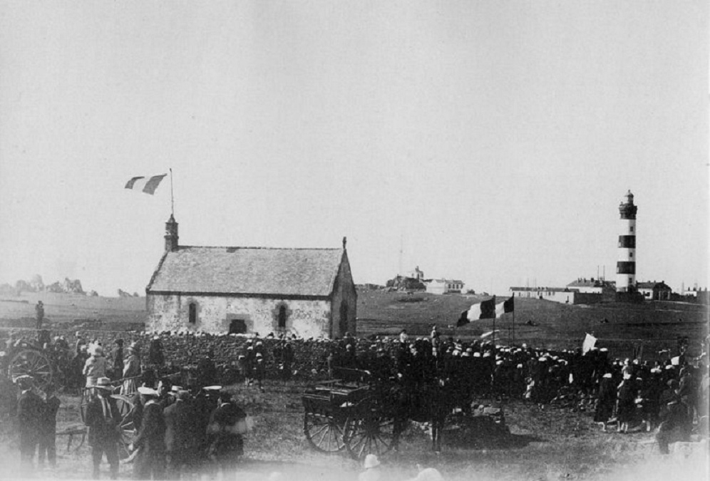 Le pardon de la chapelle Saint-Gildas en 1925 (auteur inconnu)